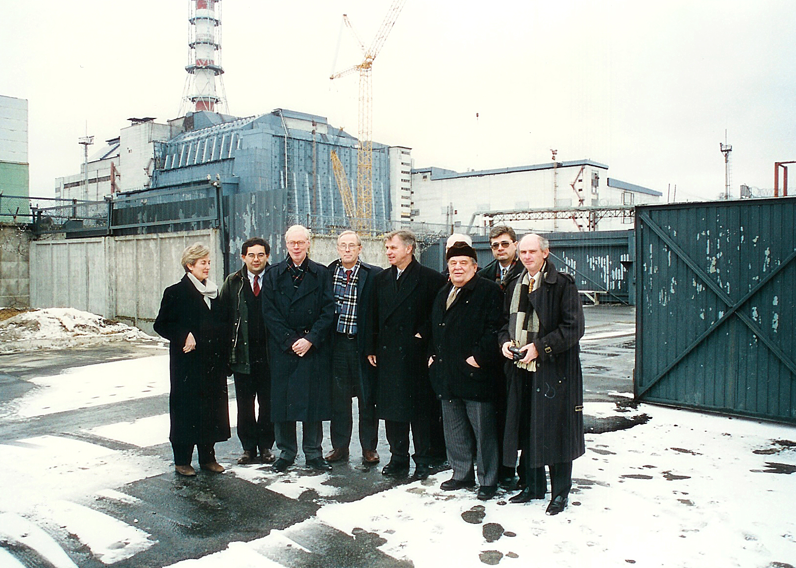 Reakter no 4 mat sengem Bunker rondrëm